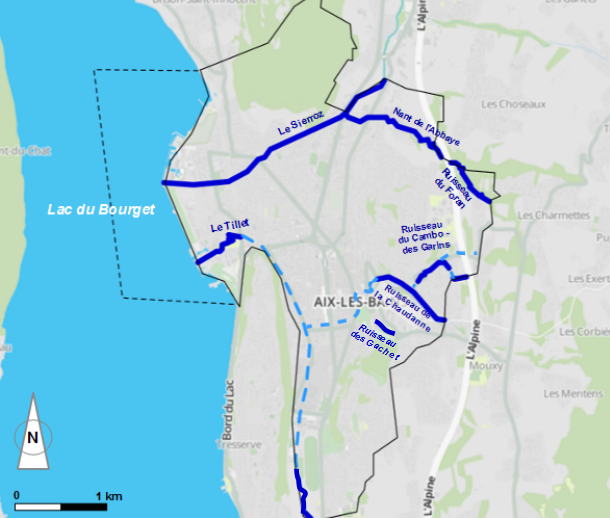 Carte des cours d'eau du territoire d'Aix-les-Bains. Réalisée à l'aide de l'Observatoire des Territoires de la Savoie.